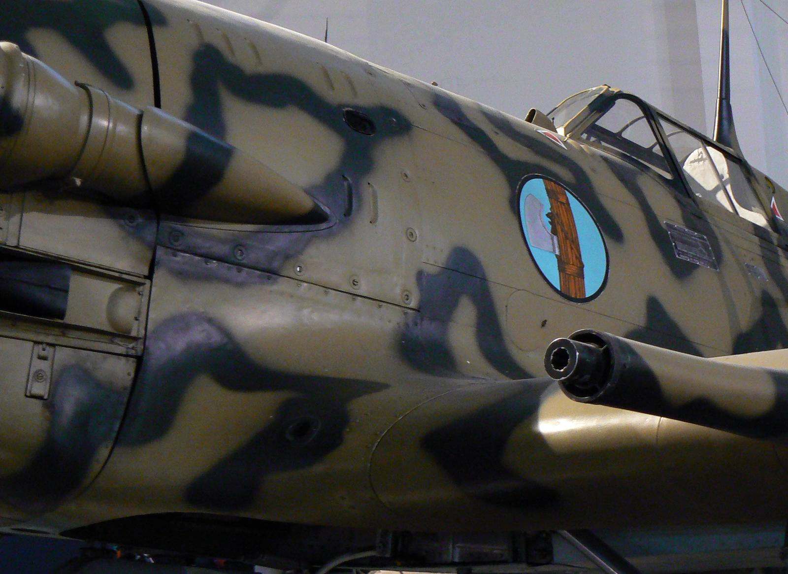 Macchi C.205 V exhibit in Milan's Museo della Scienza (science museum)